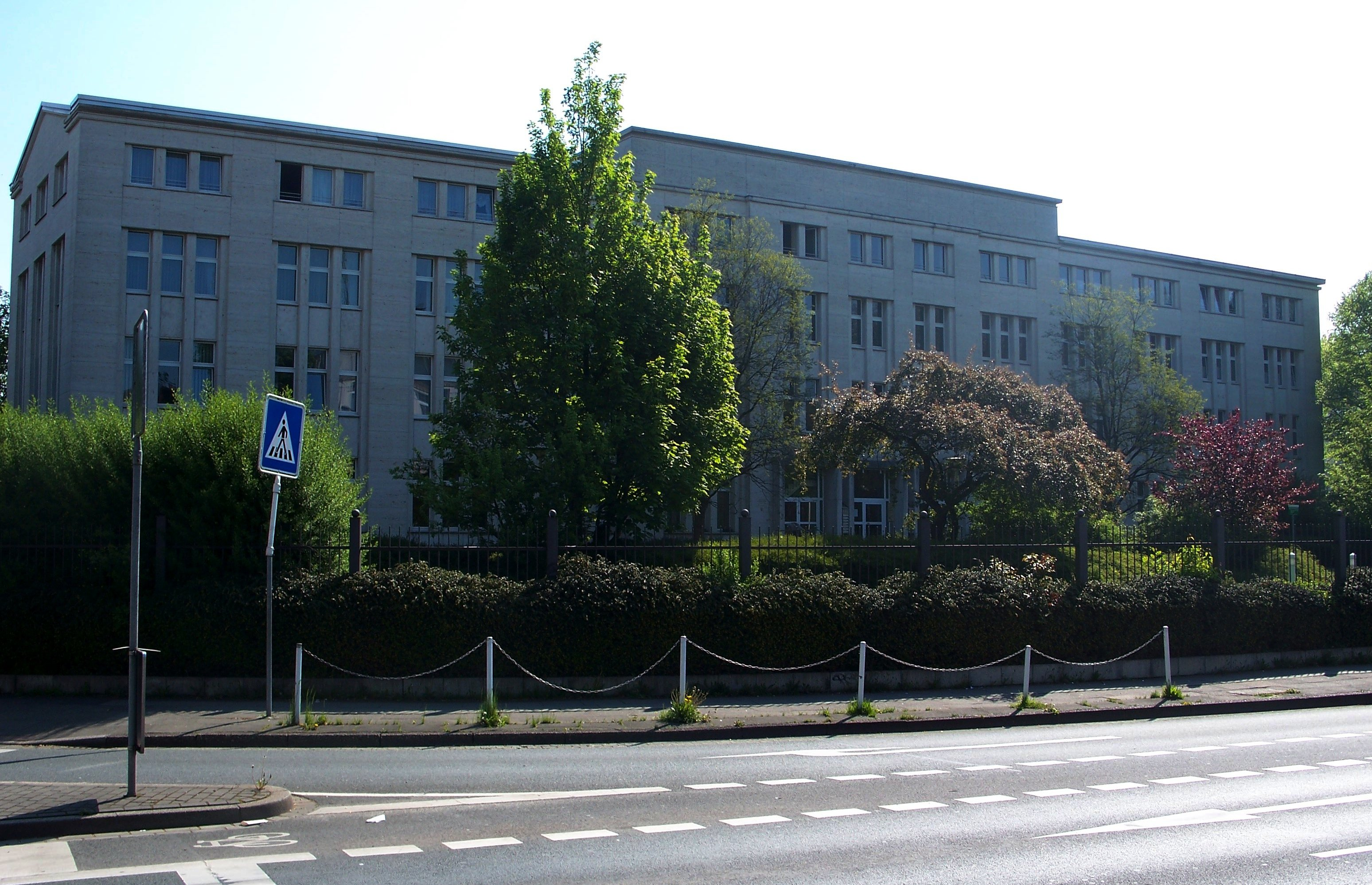 Verwaltungsgebäude der CEAG in Dortmund 2009